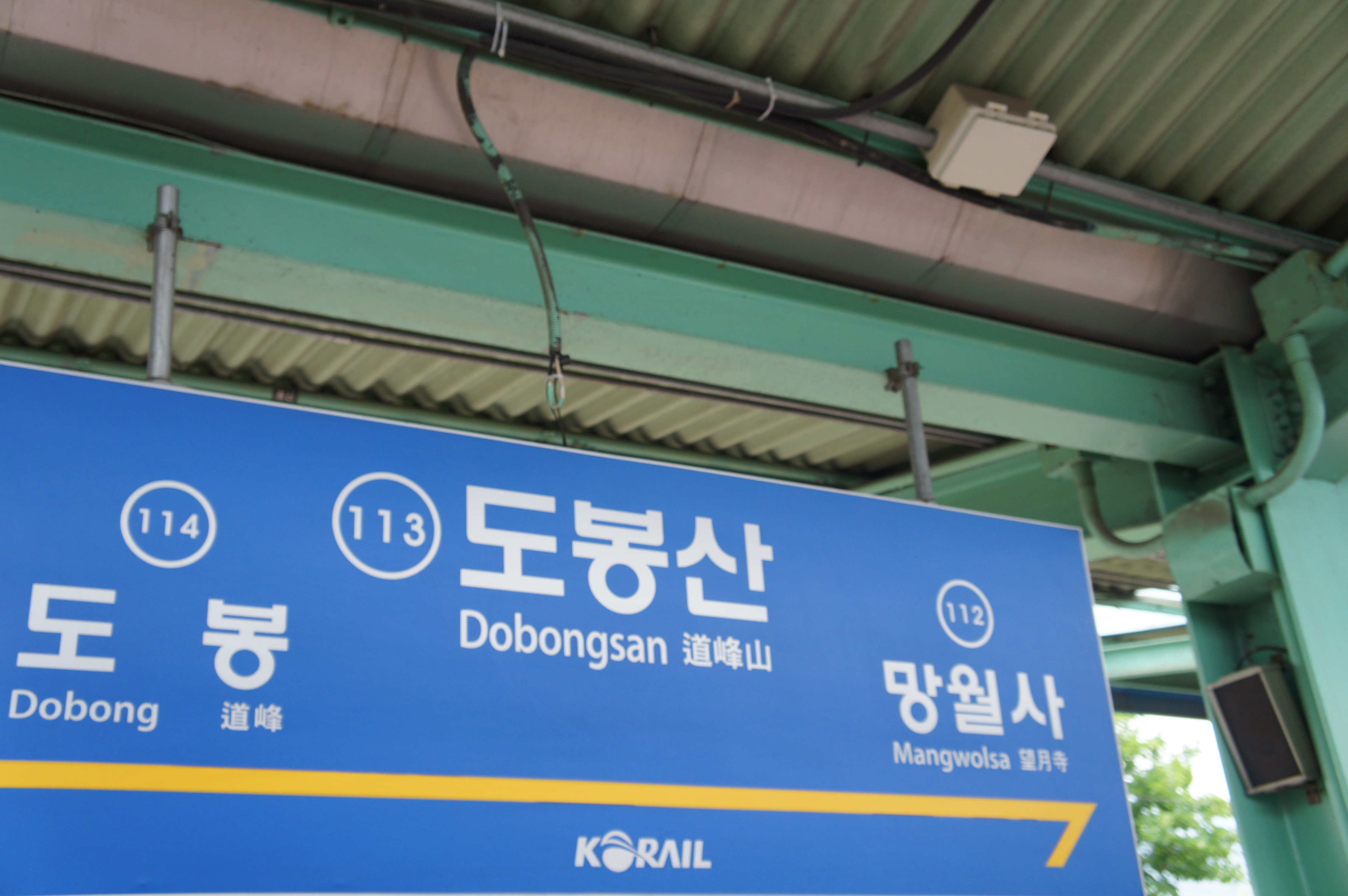 1호선 (경원선 도봉산역 역명판)